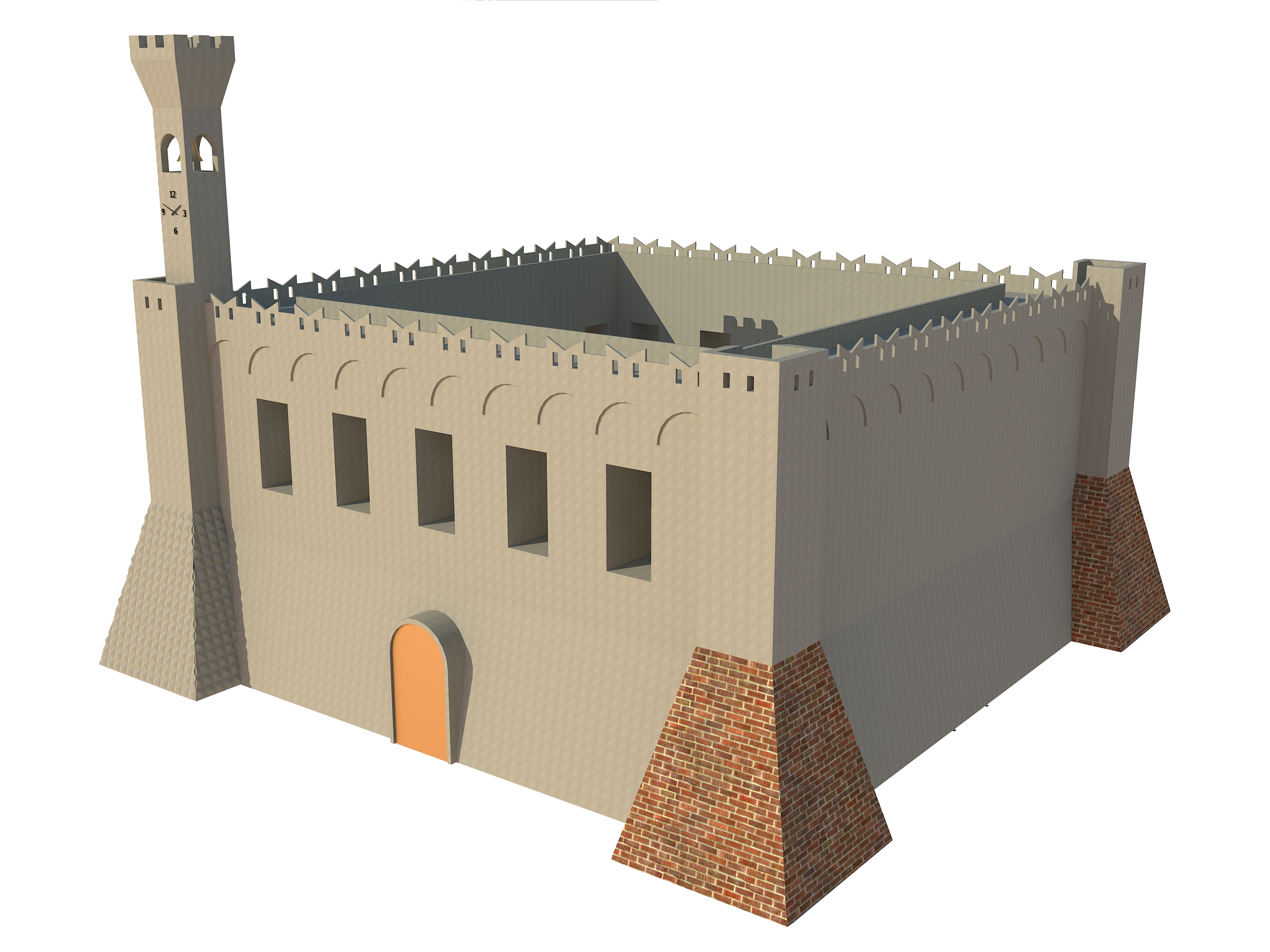 Questa è una ricostruzione grafica del castello di Briatico vecchia, tratta dai miei studi esplicitati qui